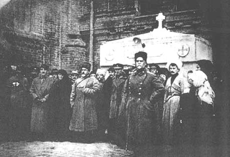 Деникин и Филимонов у могилы Вождя и основателя Добровольческой армии генерала Михаила Алексеева, Екатеринодар, 1918 год